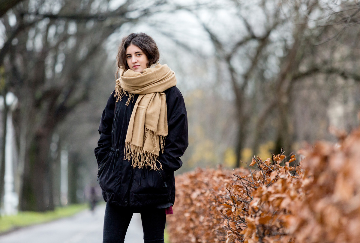 Izaro Andres musikariari ARGIA astekariaren 2542 zenbakiko elkarrizketarako Dani Blancok egindako argazkia